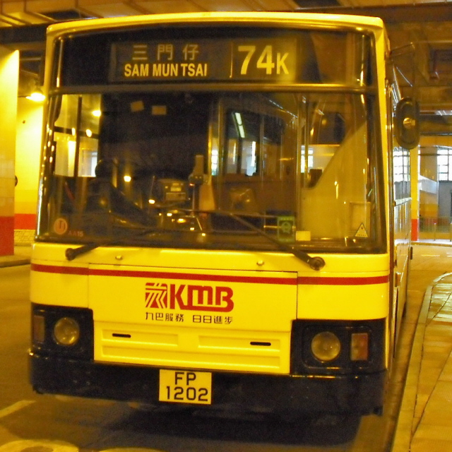 九龍巴士74K線，攝於大埔墟站巴士總站